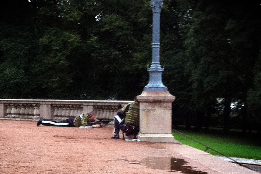 Umiddelbart etter eksplosjonen i Regjeringskvartalet forsterket Garden vaktholdet rundt Slottet. Her er to gardister i stilling på Slottsplassen, iført skuddsikker vest over den ellers velkjente paradeuniformen.